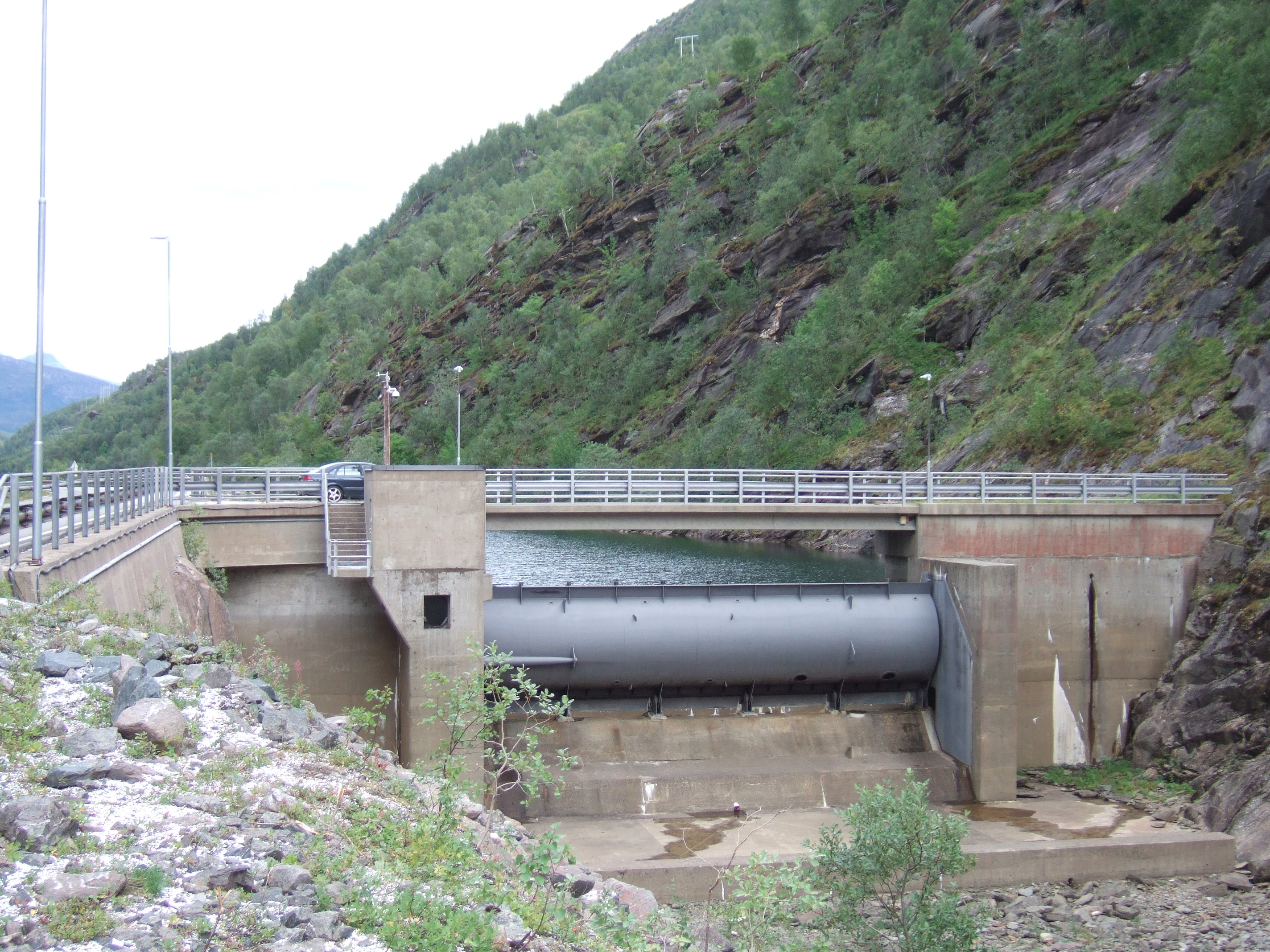 Inntak for Sjønstå kraftverk i den vestre enden av Langvatnet i Sjønstådalen i Fauske kommune i Nordland.